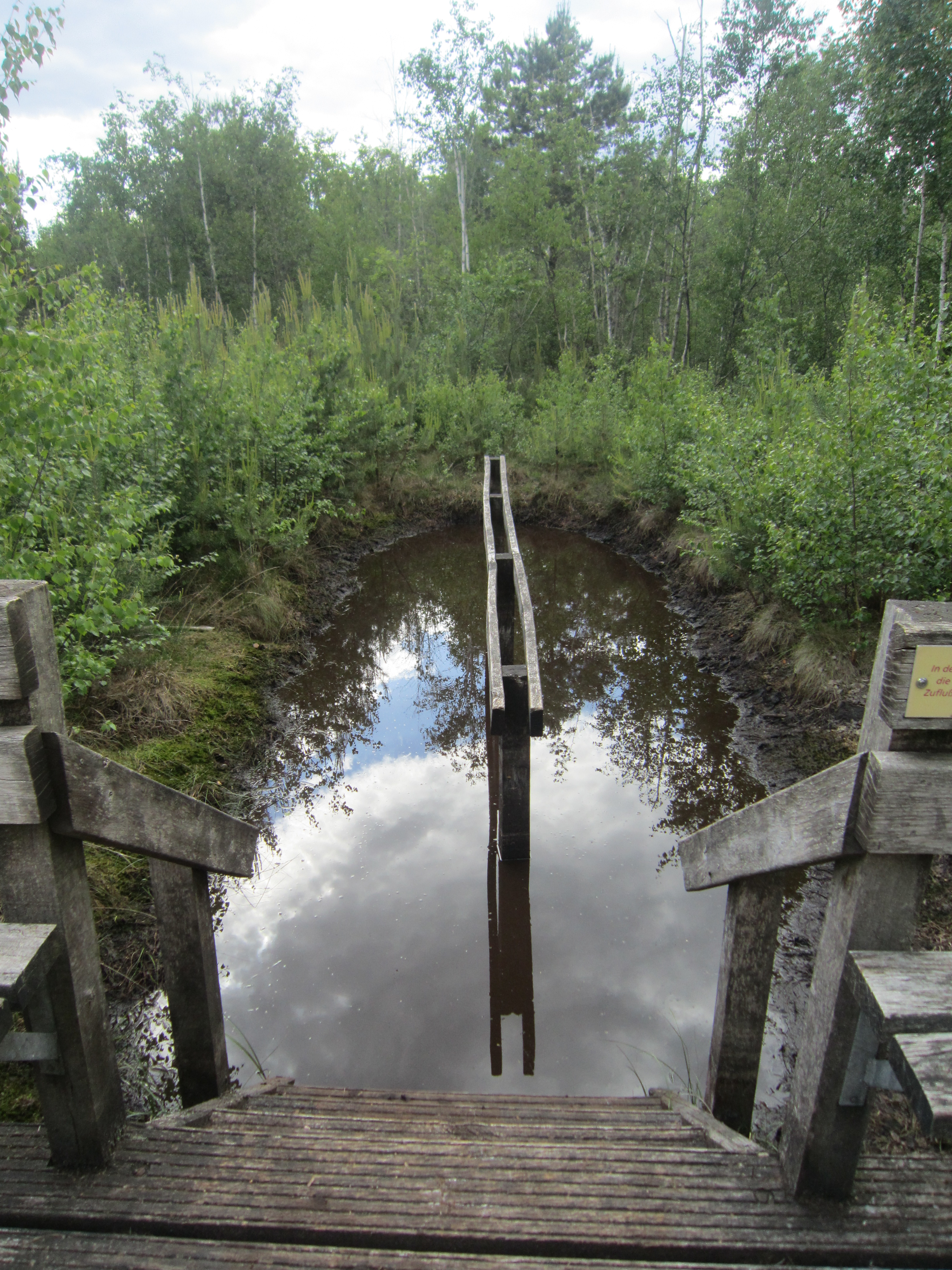 "Moormatschbecken" als Wassertretanlage am Rand des "Moorpads" bei der Endstation der Moorbahn Ströhen (Gemeinde Wagenfeld im niedersächsischen Landkreis Diepholz)